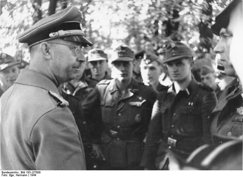 Heinrich Himmler mit SS-Männern Scherl Bilderdienst: Der Reichsführer-SS im Westen. Der Reichsführer-SS Heinrich Himmler, der am 7.Oktober d. Js. 44 Jahre alt wird, im Gespräch mit Männern der Waffen-SS im Westen. SS-PK: Ege [1944] Abgebildete Personen: Himmler, Heinrich: Reichsführer der SS, Deutschland (PND 11855123X)